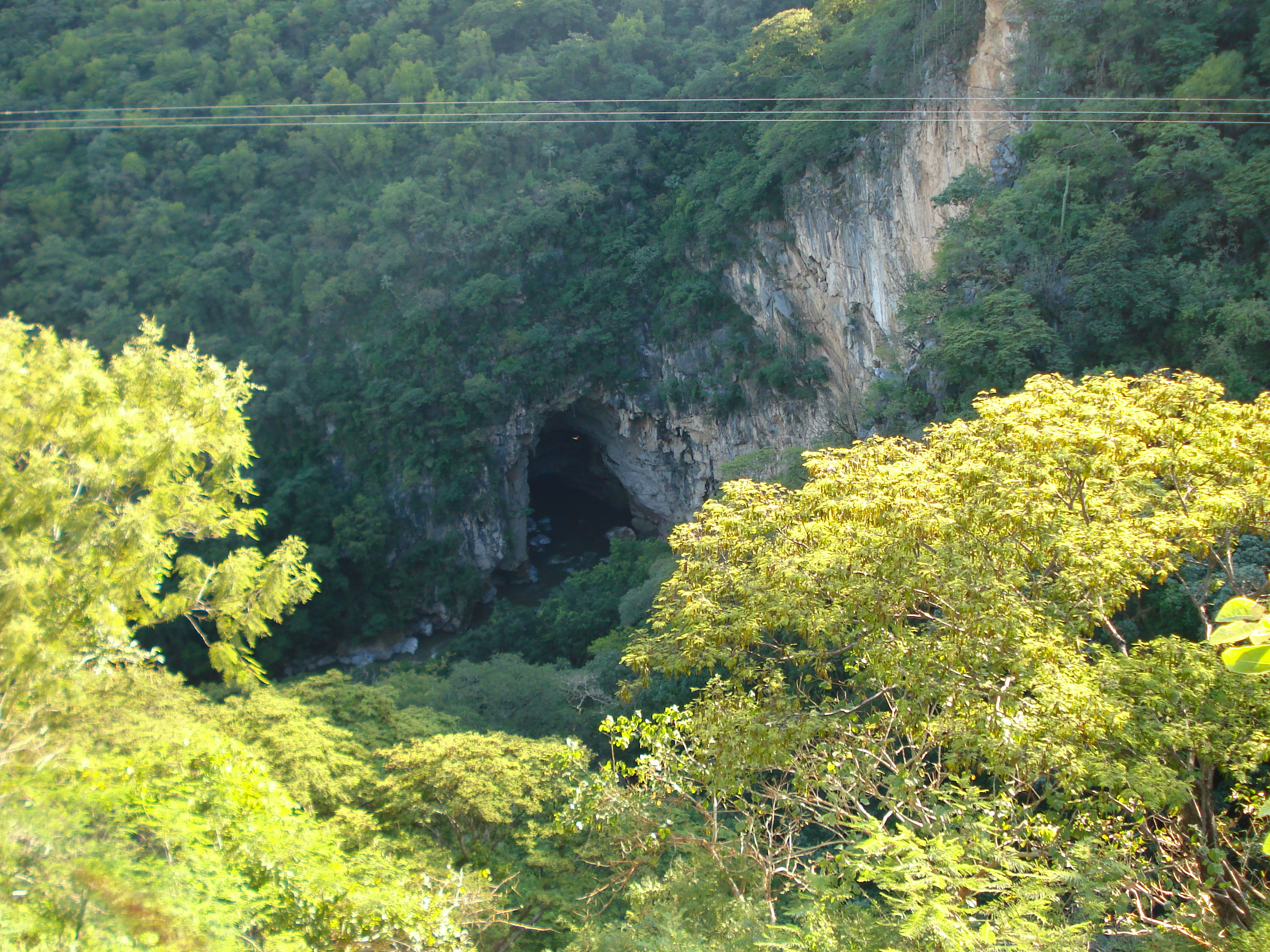 Foto Panoramica